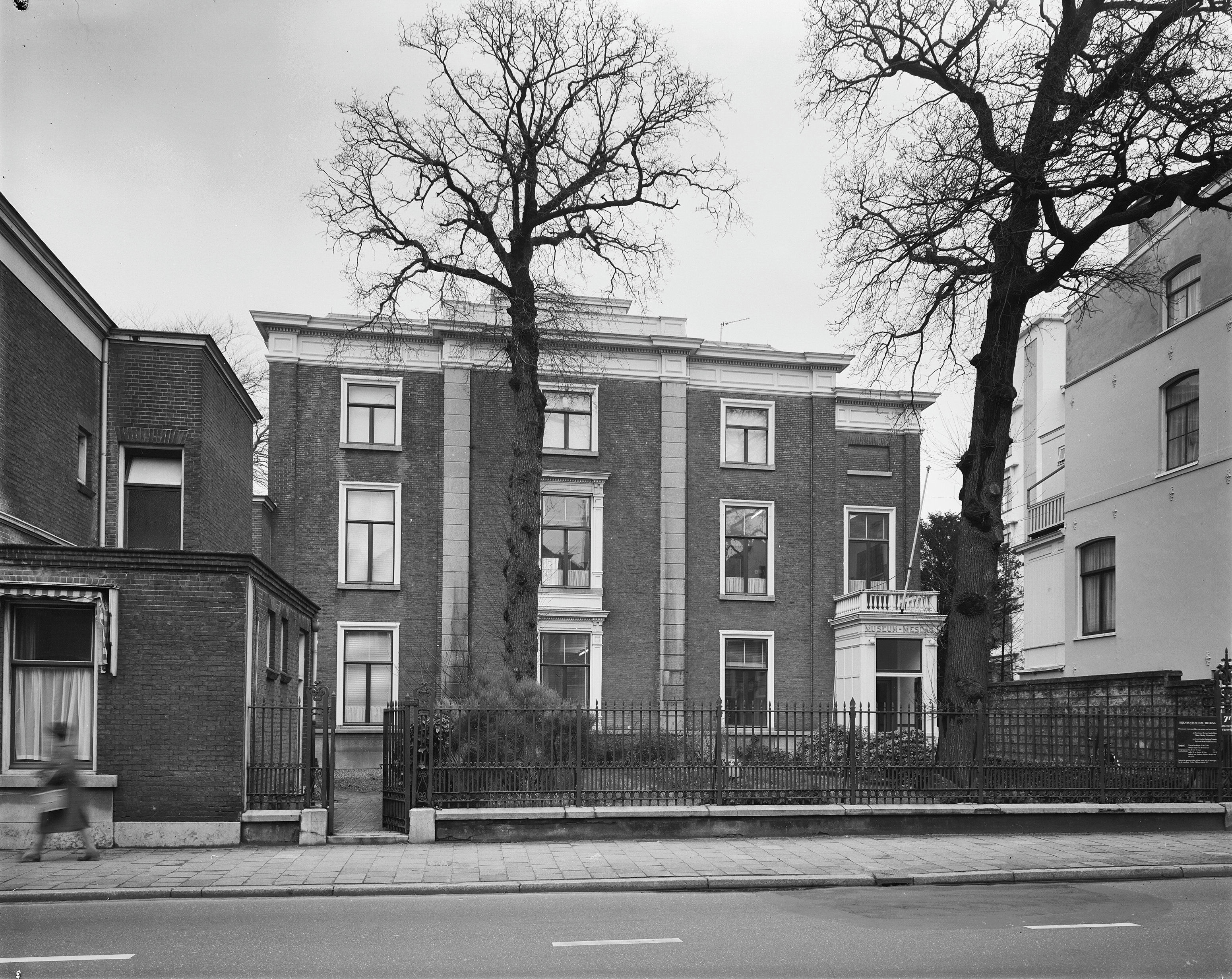 Mesdag Museum: voorgevel